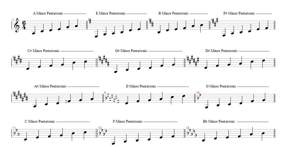 گامهای مینور پنتاتونیک